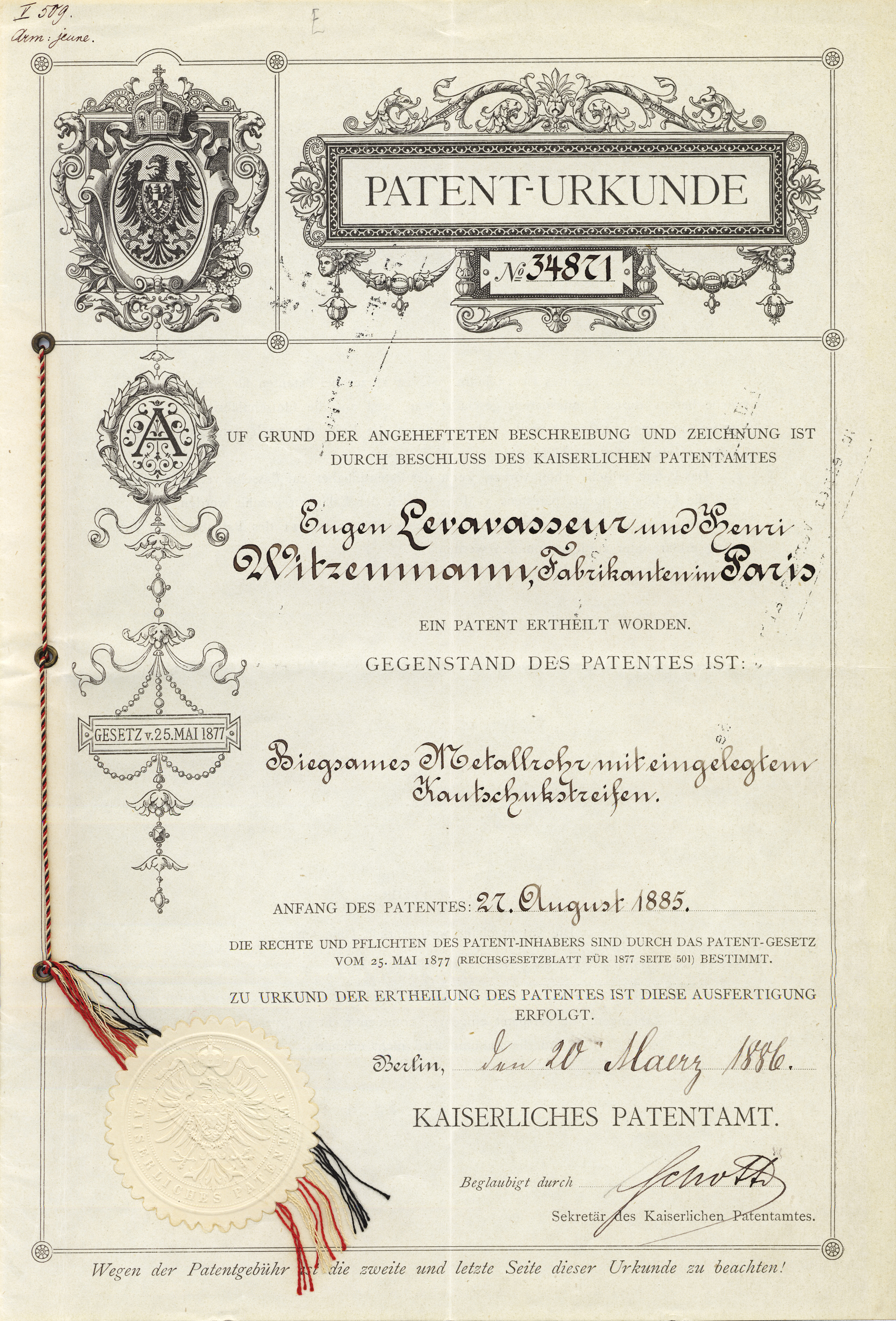 Patent 34871 von 1885 über die Erfindung des Metallschlauches